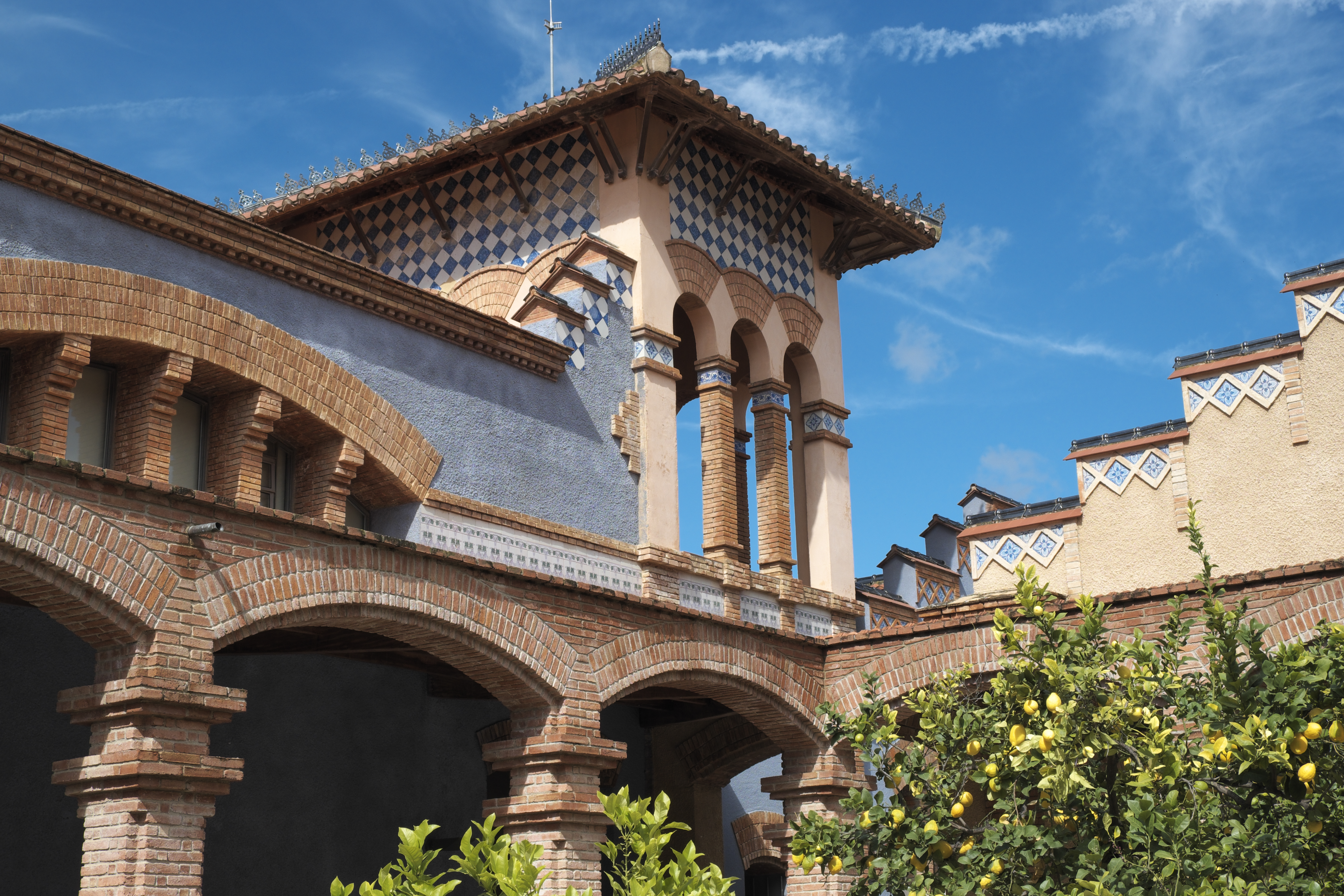 Ehemaliger Schlachthof in Tortosa in der Provinz Tarragona (Katalonien/Spanien), 1906/08 von Pablo Monguió errichtet, Eckaufbau